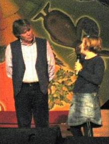 Rolf Zuckowski während eines Konzerts in Baden-Baden am 17.11.2006